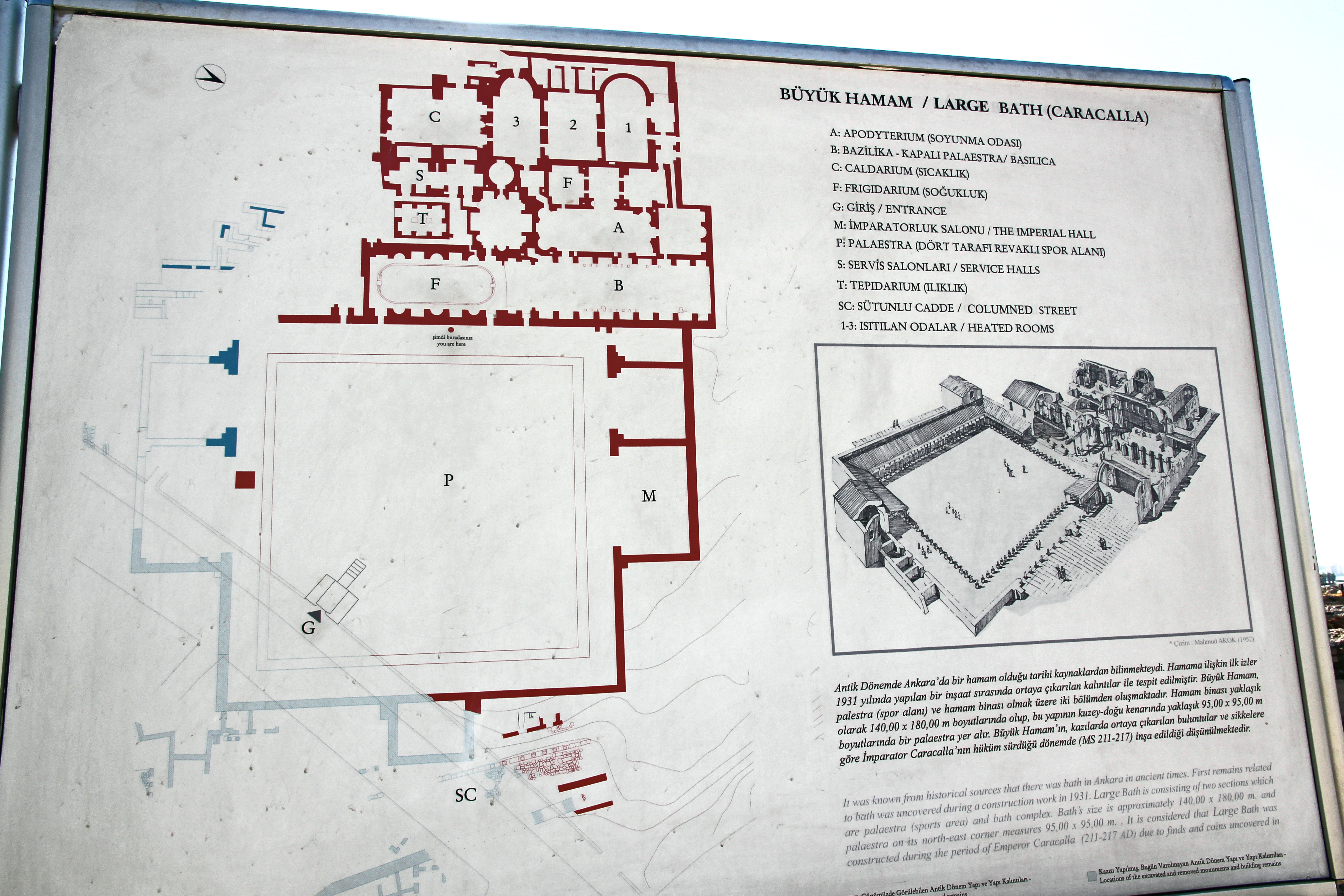 Caracalla-Thermen in Ankara, Schild mit Plan